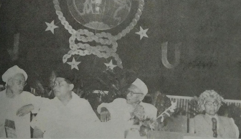 Bagaimana jalannya sidang-sidang syuriyah selama Muktamar dimusyawarahkan juga oleh tokoh-tokoh PBNU. Dari kiri kekanan tampak: KH. Bisri Syansuri, KH. Muhammad Dahlan, KH. Abdul Wahab Chasbullah, dan KH.R. Asnawi.